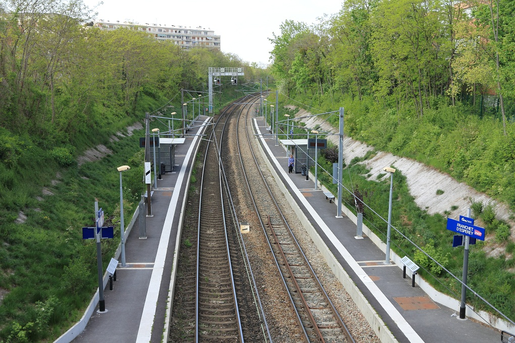 Vue des voies en direction de Reims en gare de Franchet d'Esperey en avril 2011, Champagne-Ardenne, France.